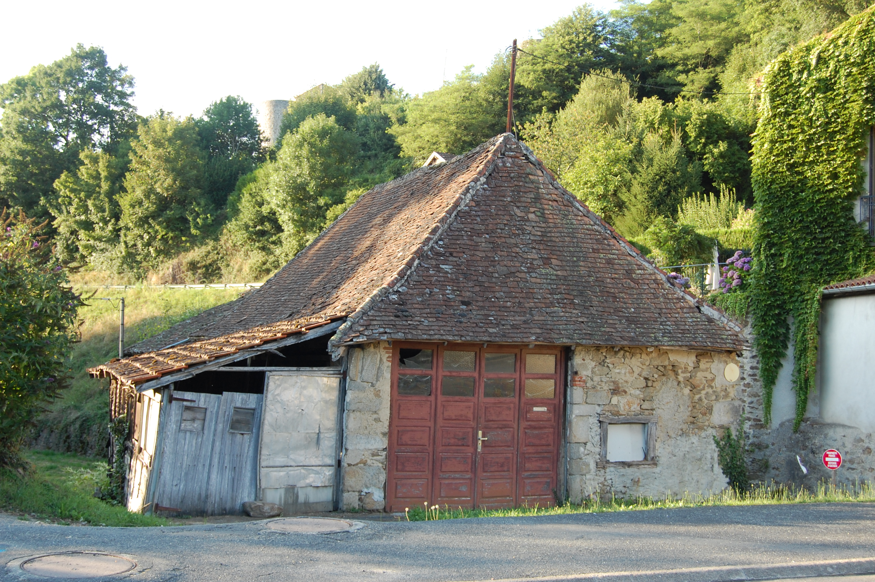 A Châlus, un bâtiment ayant conservé sa couverture ancienne en tuiles plates